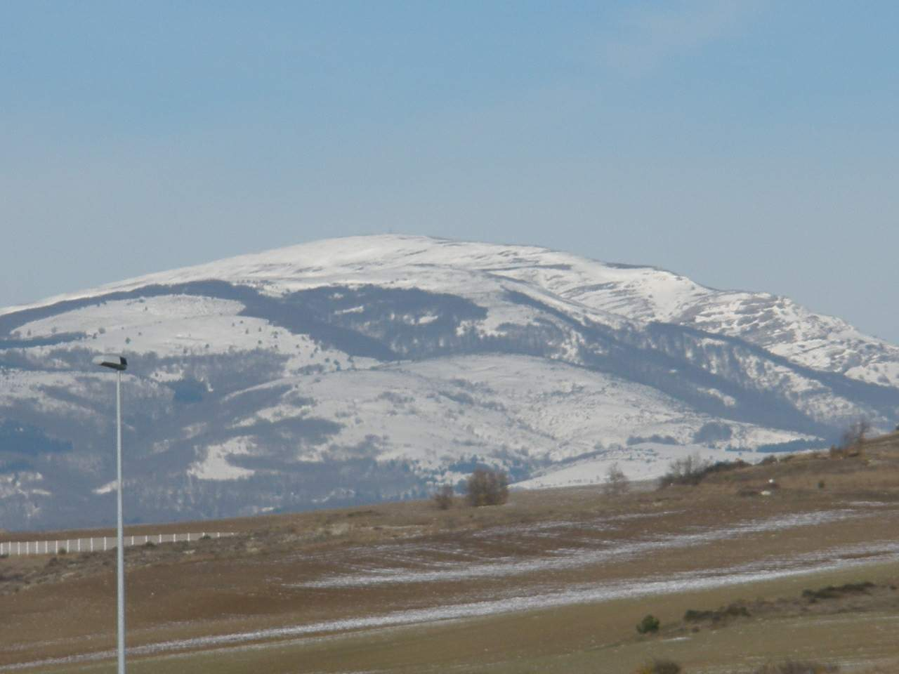 El monte Gorbea, vista desde Vitoria